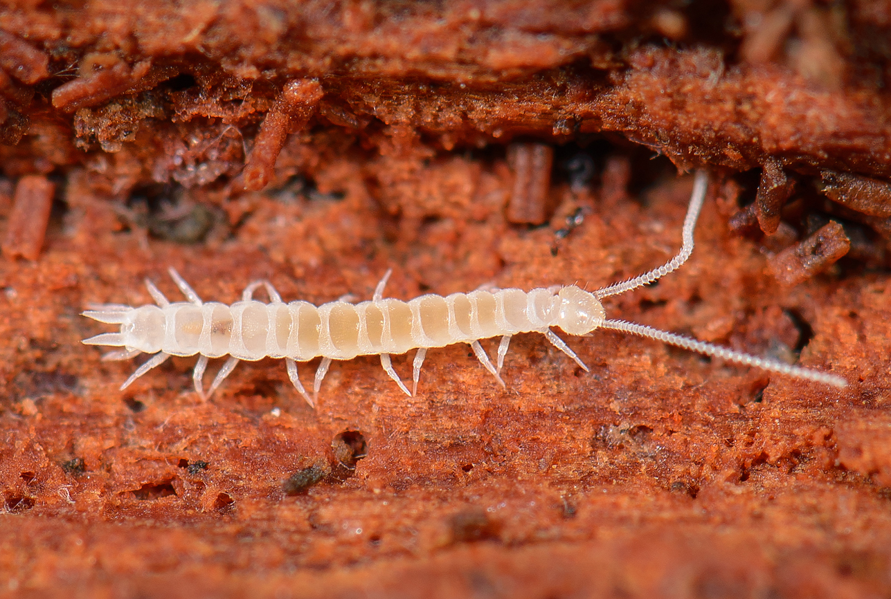 Symphyla da família Scutigerellidae